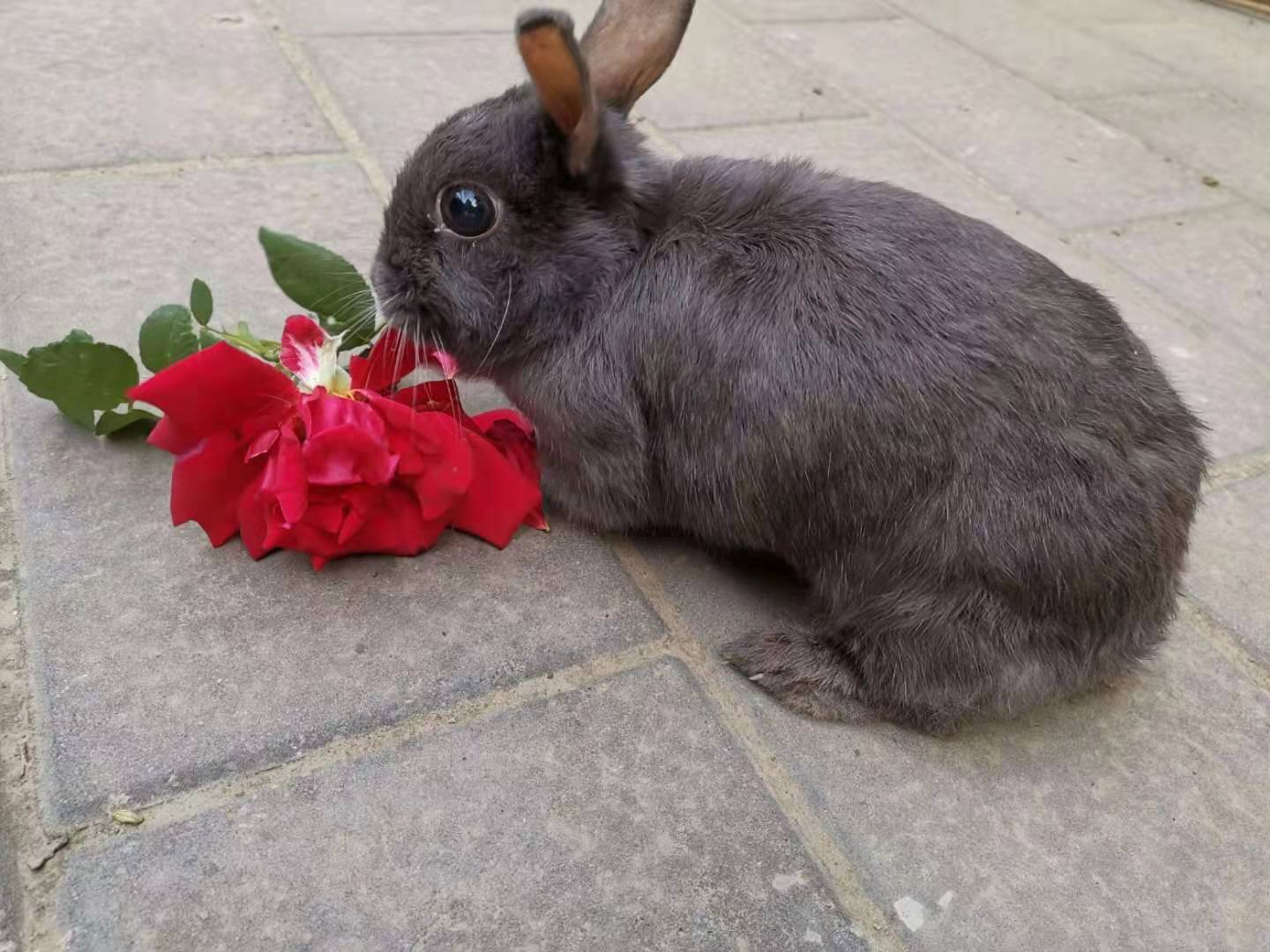 rabbit with red flower